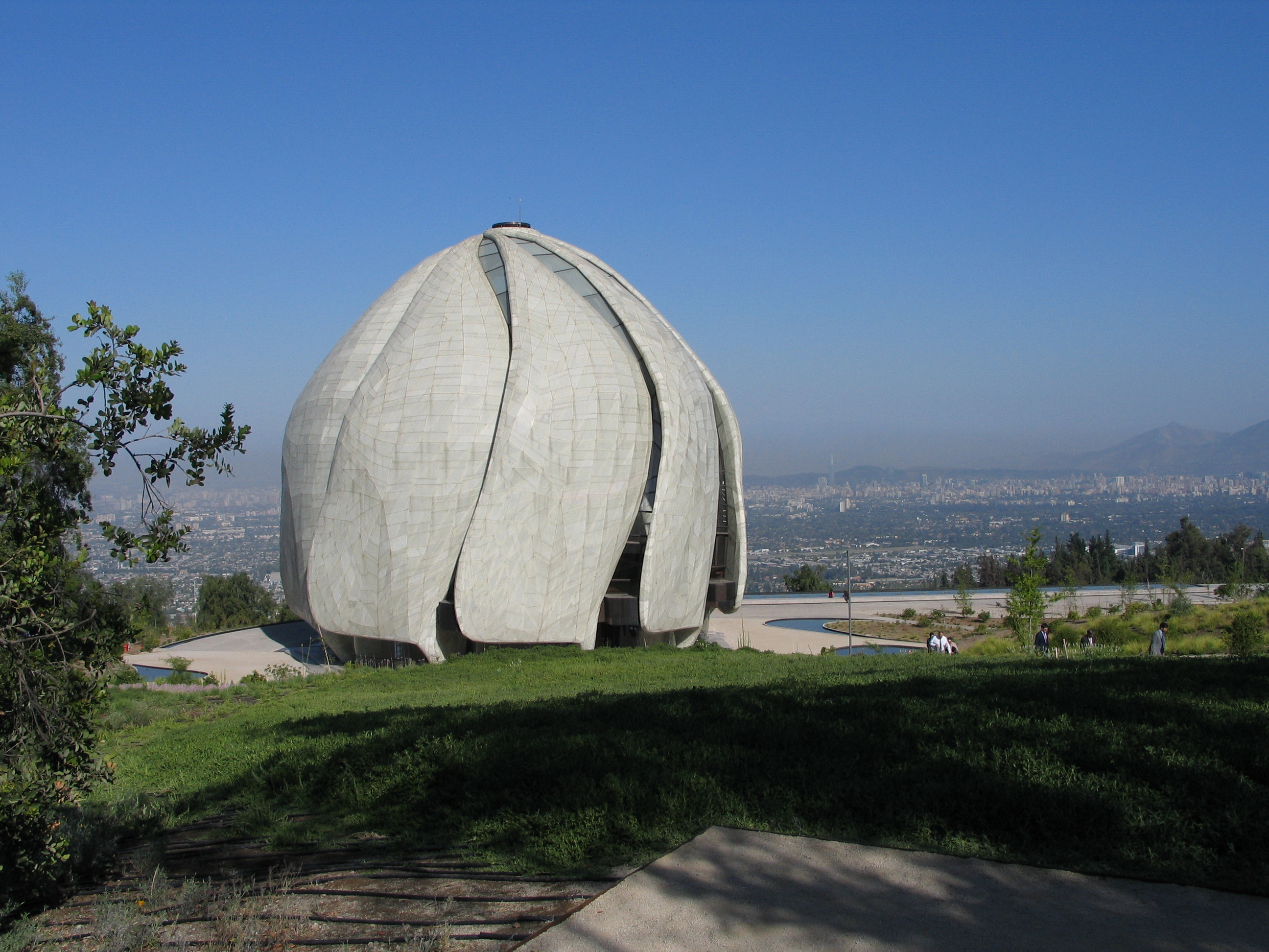 Templo Bahá'i Ubicado en Peñalolen, Santiago de Chile. es el primer templo de esta religión en latinoamerica, Su inaguracion fue en el año 2016. Su estructura principal es metalica revestida con paneles de marmol y cristasles